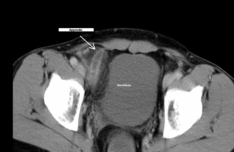 Es handelte sich um einen circa 40-jährigen Mann. Im Ultraschall war kaum etwas zu sehen. Der Patient hatte 39°C Fieber und starke Schmerzen im ganzen Unterbauch. Das CT lieferte eine klare Diagnose.